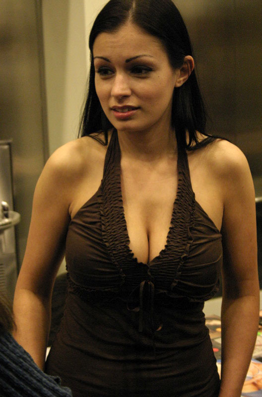 Aria Giovanni